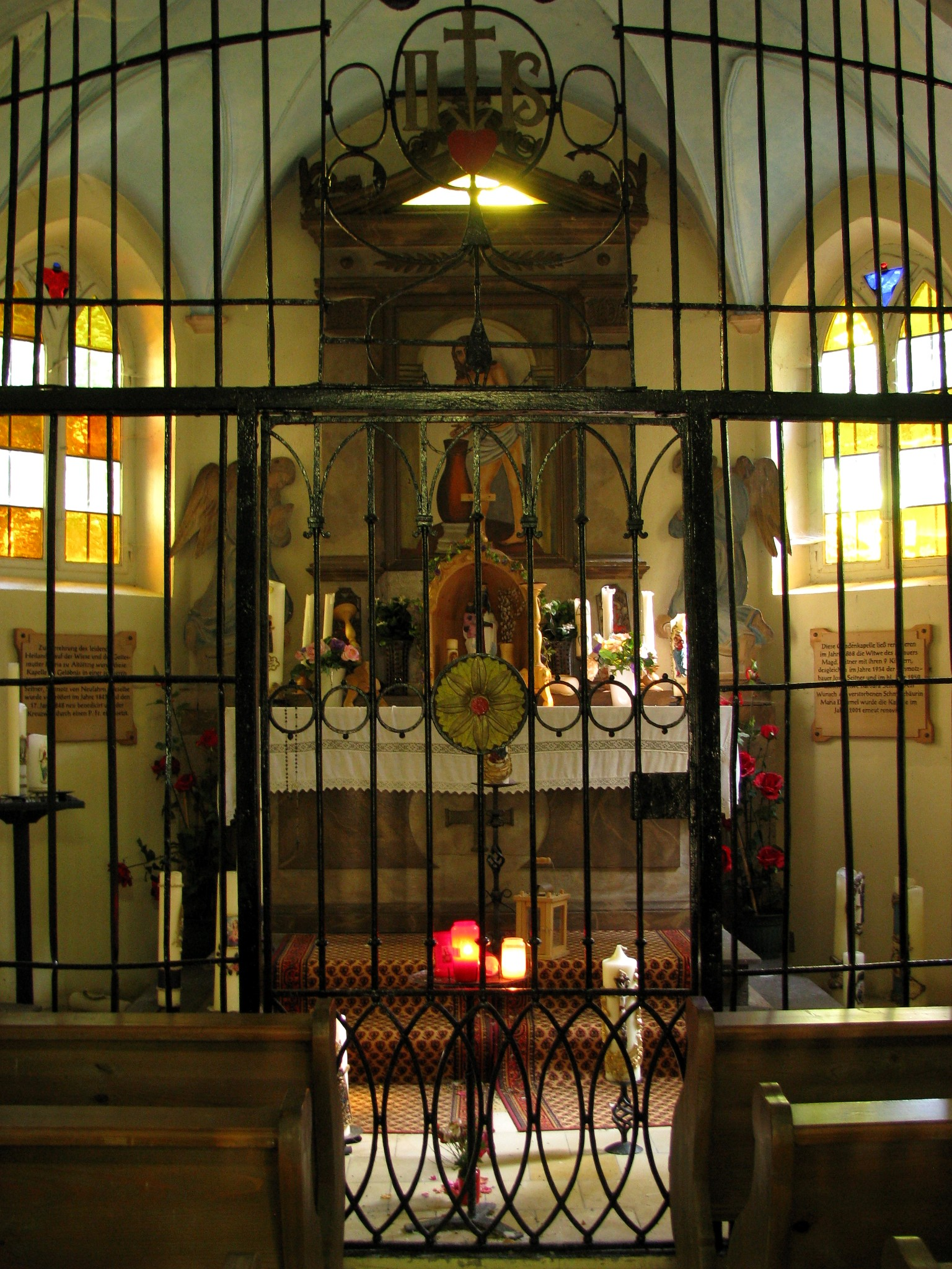 Kindswieskapelle bei Neufahrn, Gemeinde Egling in Oberbayern; Innenraum